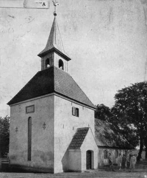 Slottskyrkan från sydväst. Kategori: (01) ExteriörerSlottskyrkan från sydväst.